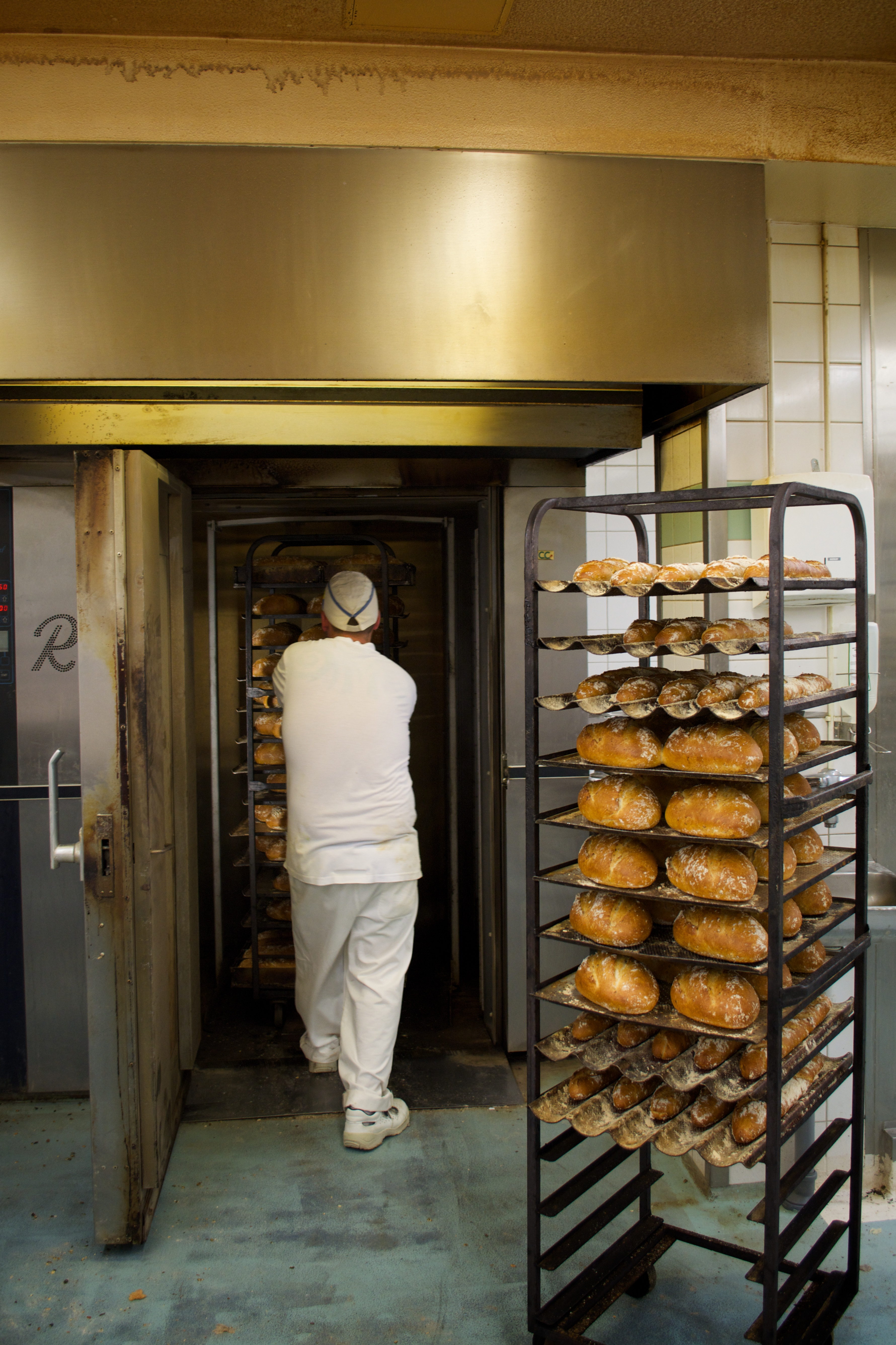 Backen von Brot in einem modernen Bäckereiofen in einem Betrieb des Traditionsbäckerei-Unternehmens „Kanniston Leipomo“ in Helsinki in Finnland.